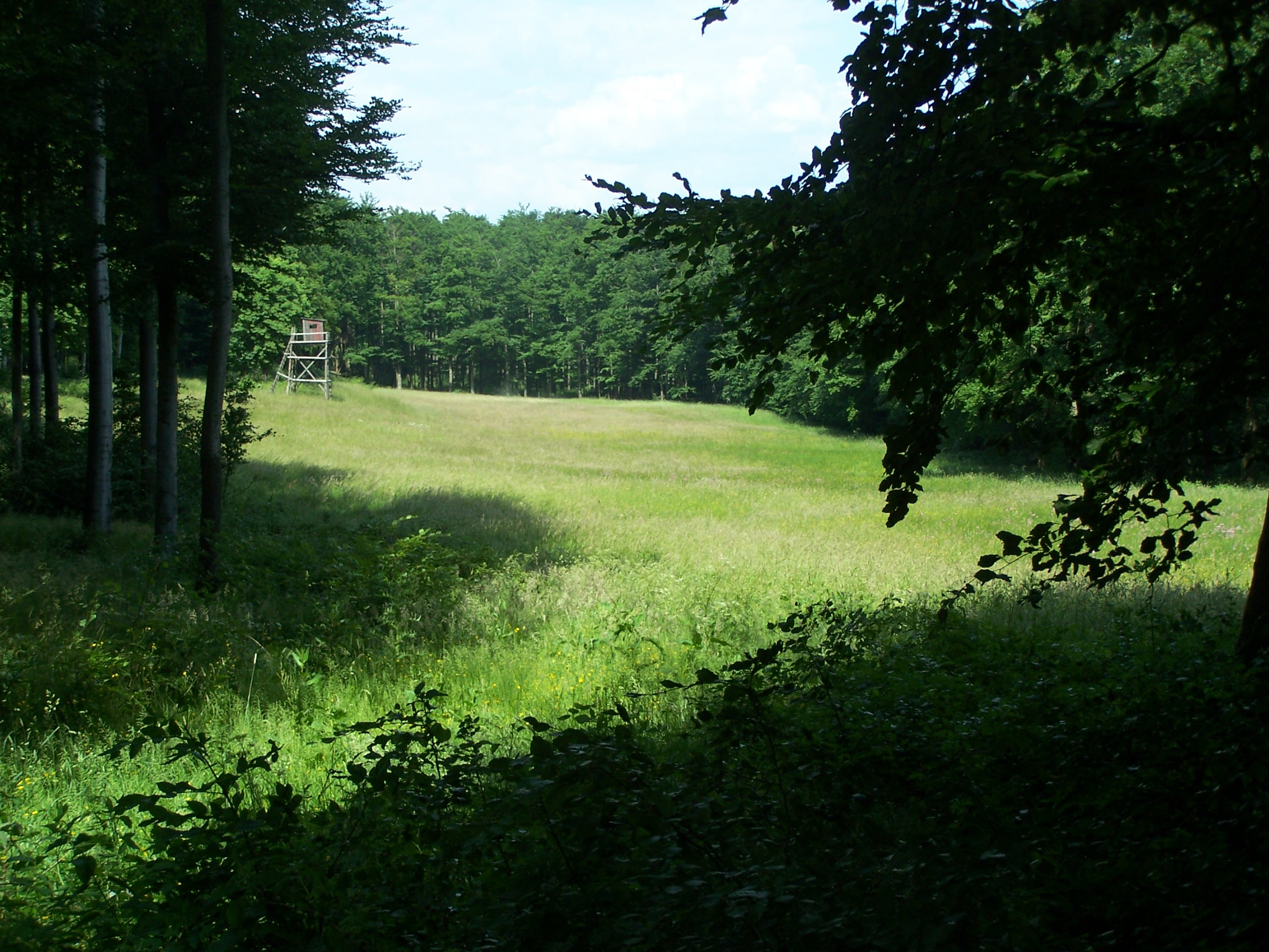 Die Fuchswiese am Rennsteig markiert den südlichsten Grenzpunkt von Wutha-Farnroda (OT Mosbach). Die ehemalige Weide grenzt rechts an den Ruhlaer Anteil des Hangsteins.